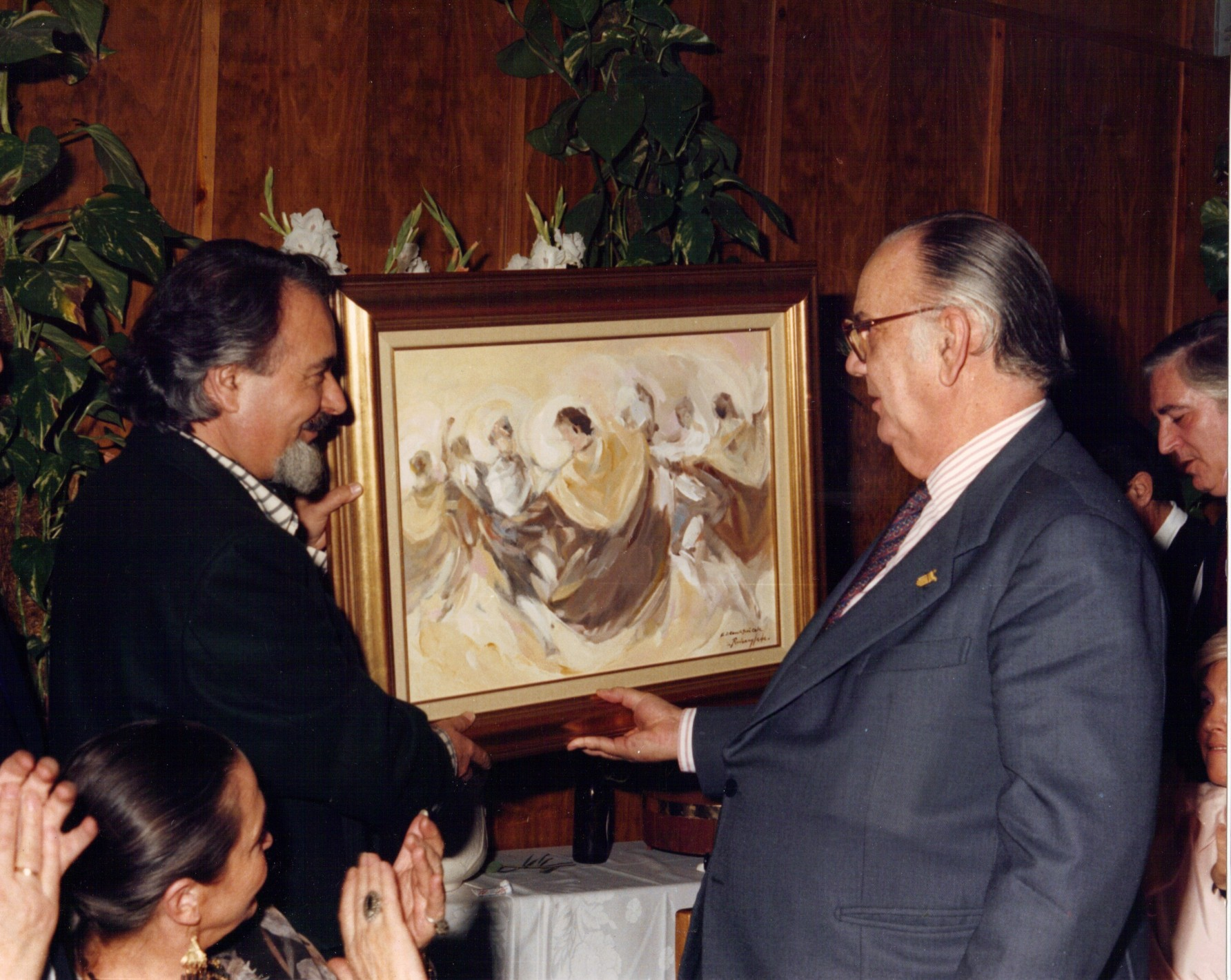 Ruizanglada - 1988 Camilo José Cela recibe una obra de Ruizanglada en el homenaje de la Peña Solera Aragonesa